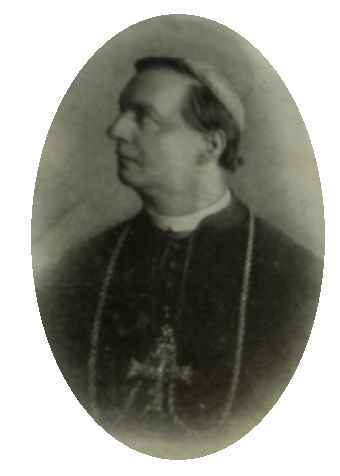 Josef Altenweisel, (1851-1912) Fürstbischof von Briven von 1904 bis 1912